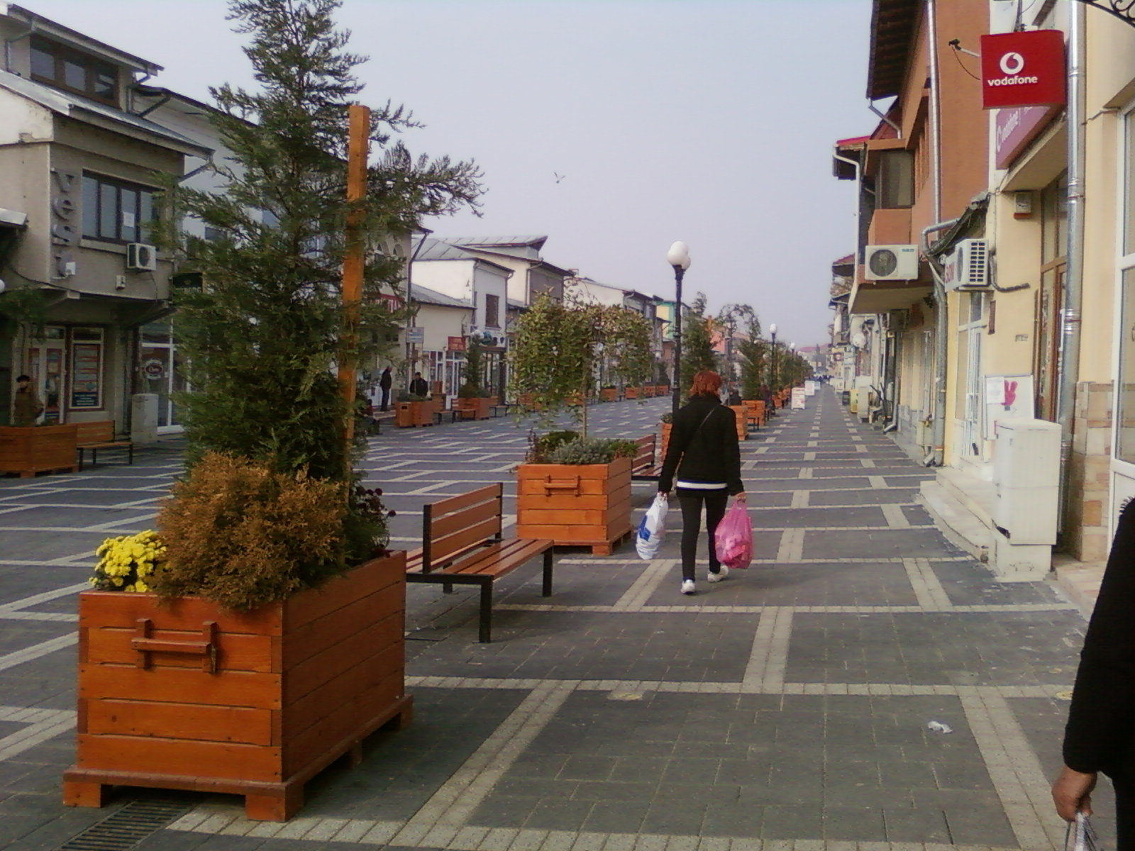 blvd. CFR